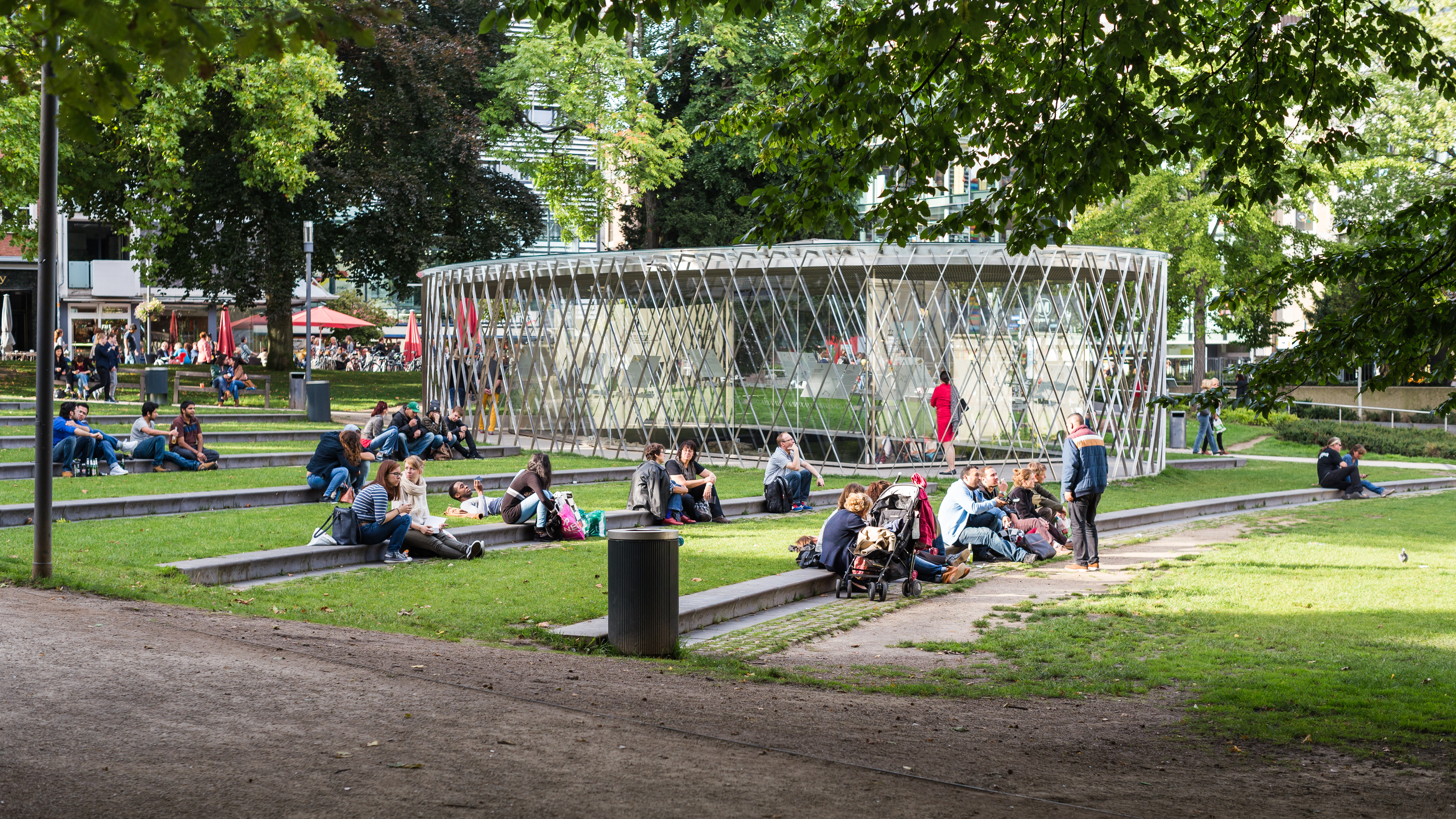 Typisches Bild eines Teils des Elisengartens in Aachen, welcher ein beliebter Treffpunkt der Bevölkerung ist